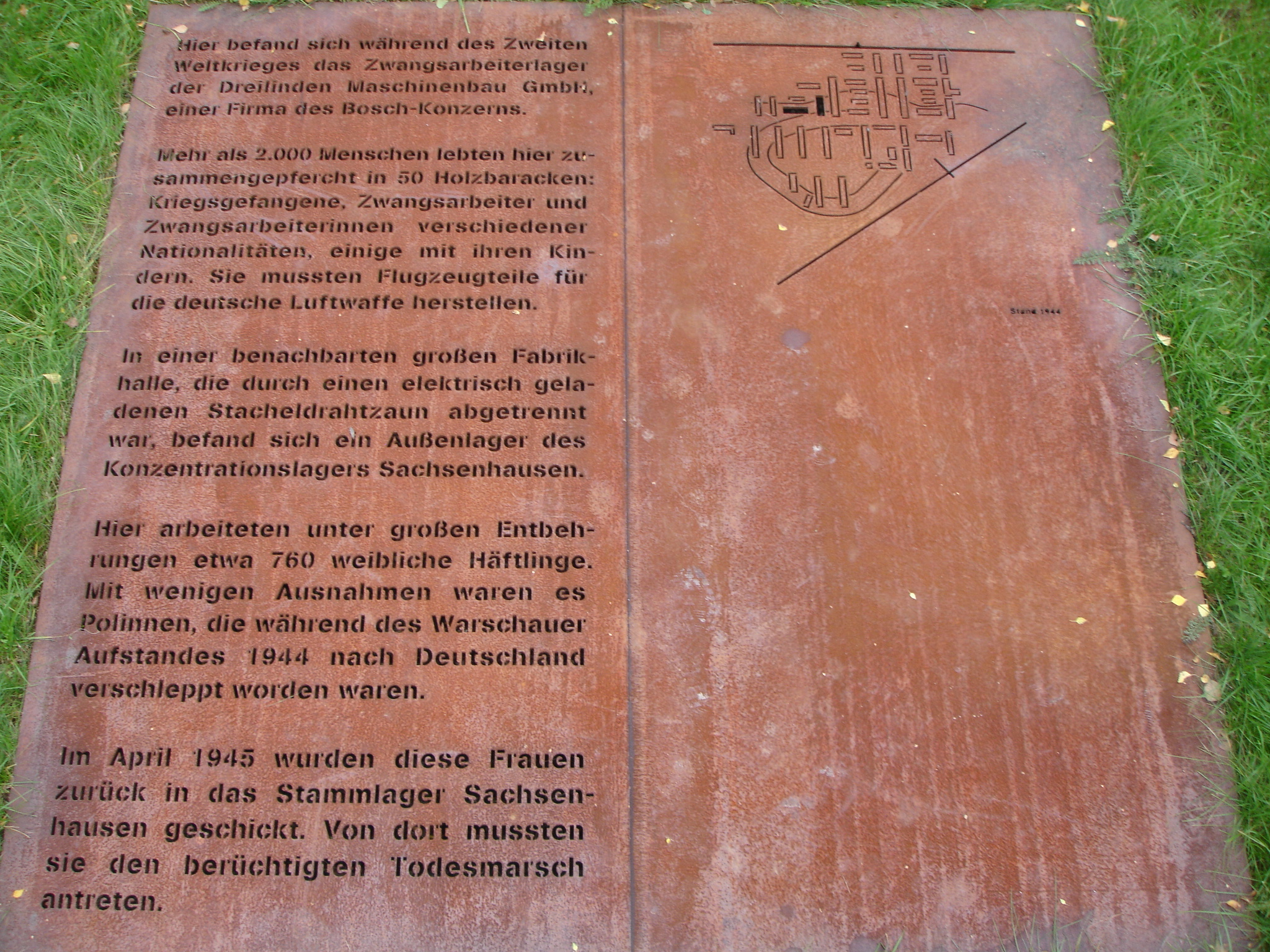 Kleinmachnow memorial tablet for forced laborer 2007 / Kleinmachnow Gedenktafel für Zwangsarbeiter 2007